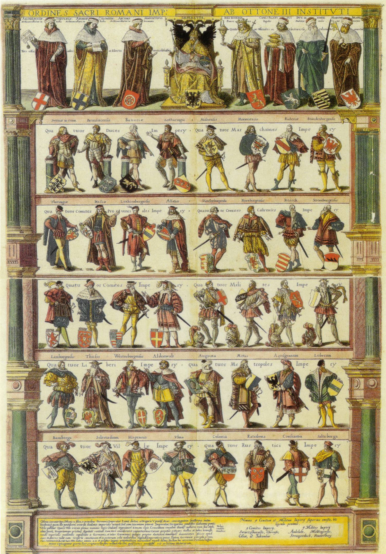 "Ordines Sacri Romani Imperii ab Ottone III instituti" Quaternionen Ordnungsschema des Heiligen Römischen Reiches in einer zeitgenössischen Darstellung. Die Darstellung war in zwei Teile geteilt, sie wurde digital zusammengefügt.